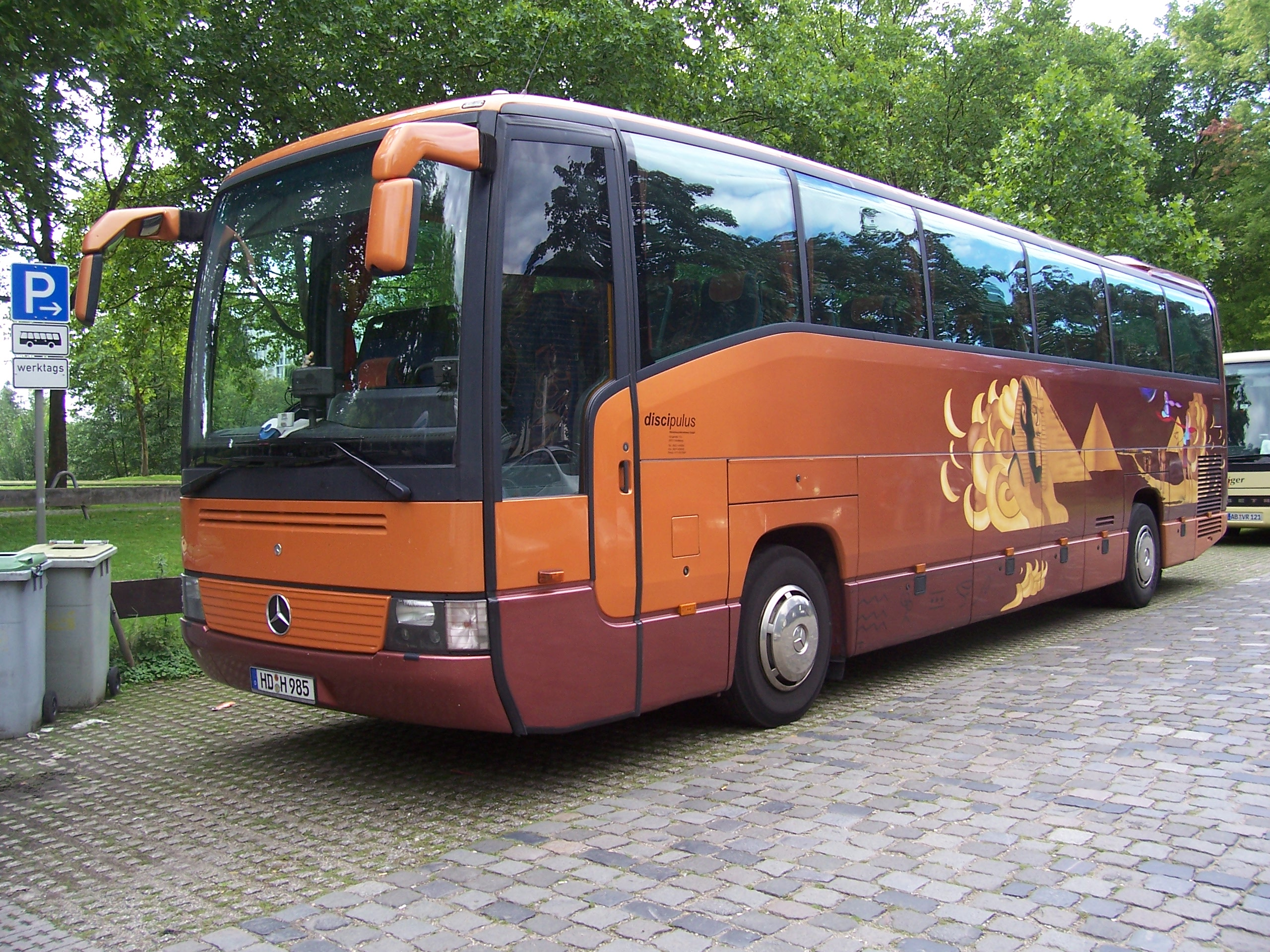 Ein Mercedes-Benz O 404 Reisebus in Mannheim.